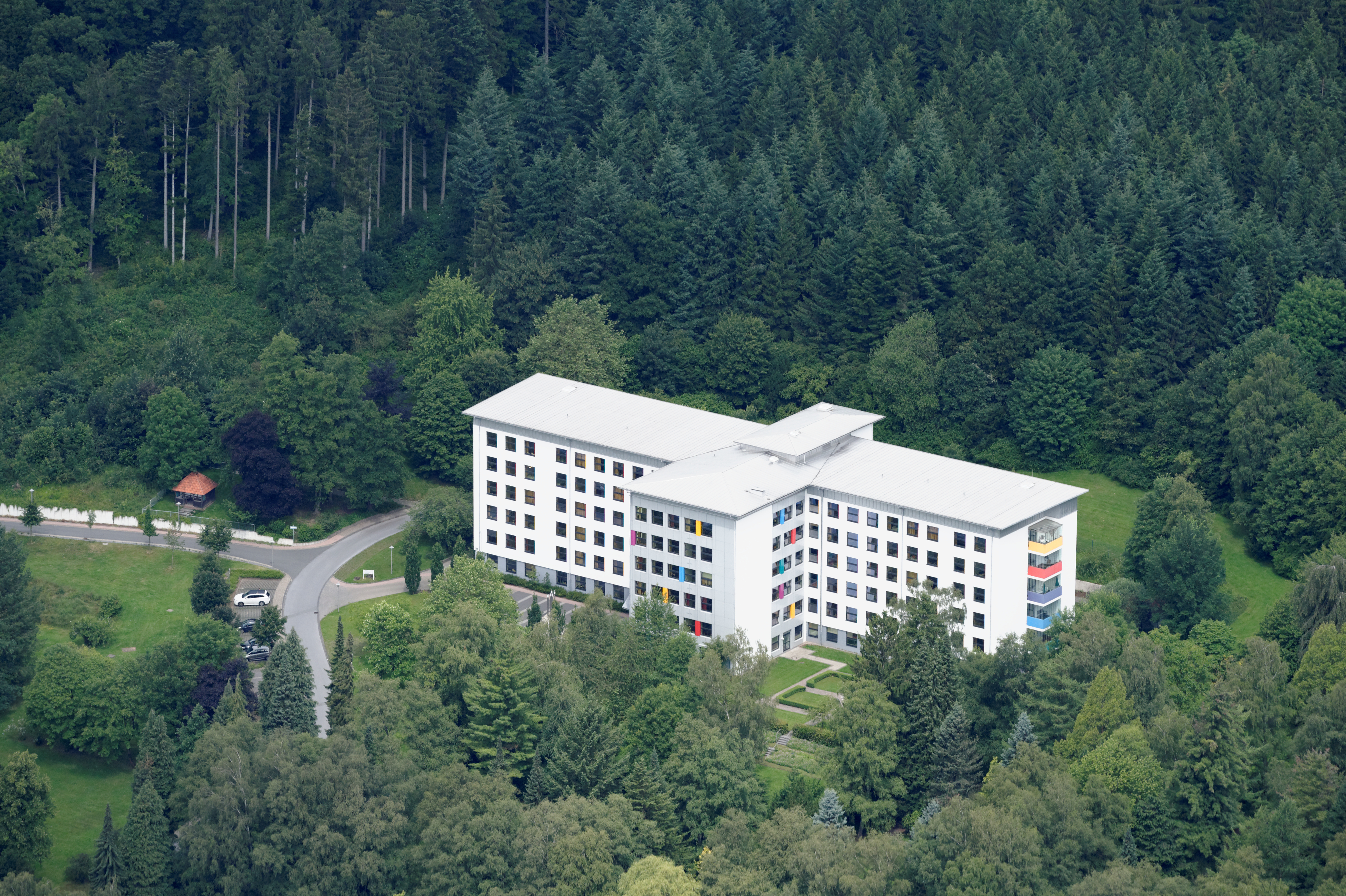 Fotoflug Sauerland Nord. Warstein, Gebäude der LWL-Klinik The making of this document was supported by the Community-Budget of Wikimedia Germany.